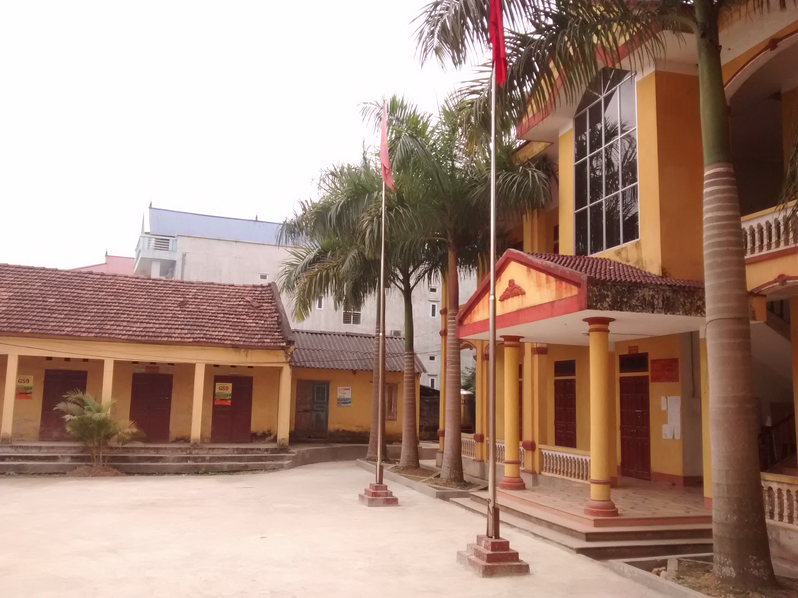 Trụ sở UBND xã Văn Khúc